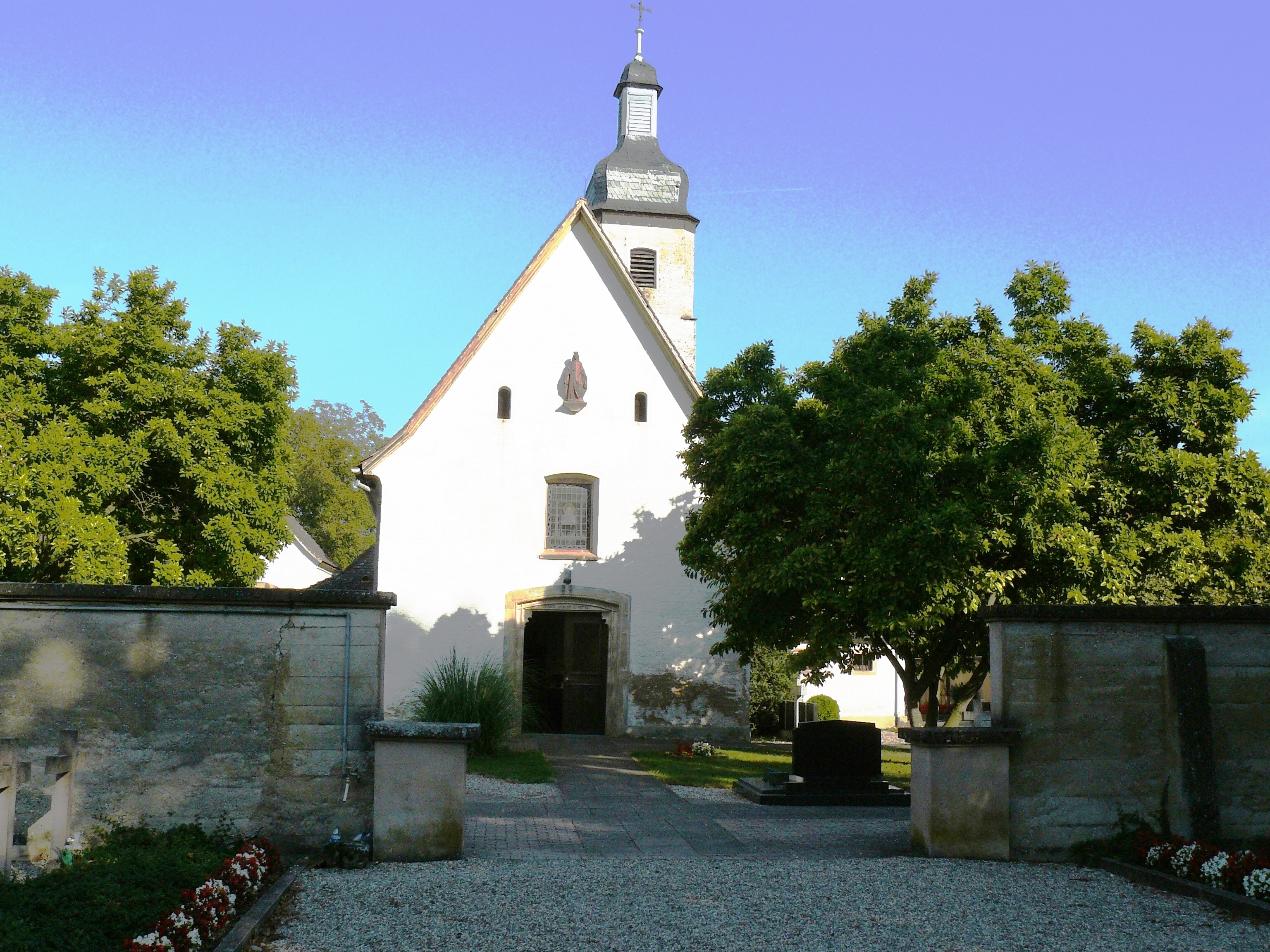 Friesenheim, hameau de Neunkirch, Eglise Notre-Dame (1455), Saint-Joseph, de la-Vierge des 7 Douleurs (église de pèlerinage)